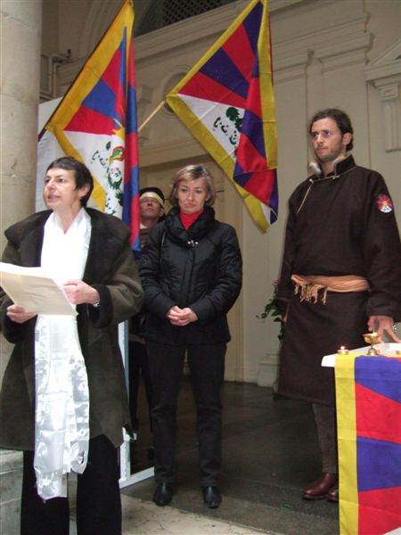 Manifestation pour le Tibet, le 31 mars, à Pau, sur le parvis de l'Hôtel de Ville en présence du député-maire de Pau Mme Lignieres-Cassou